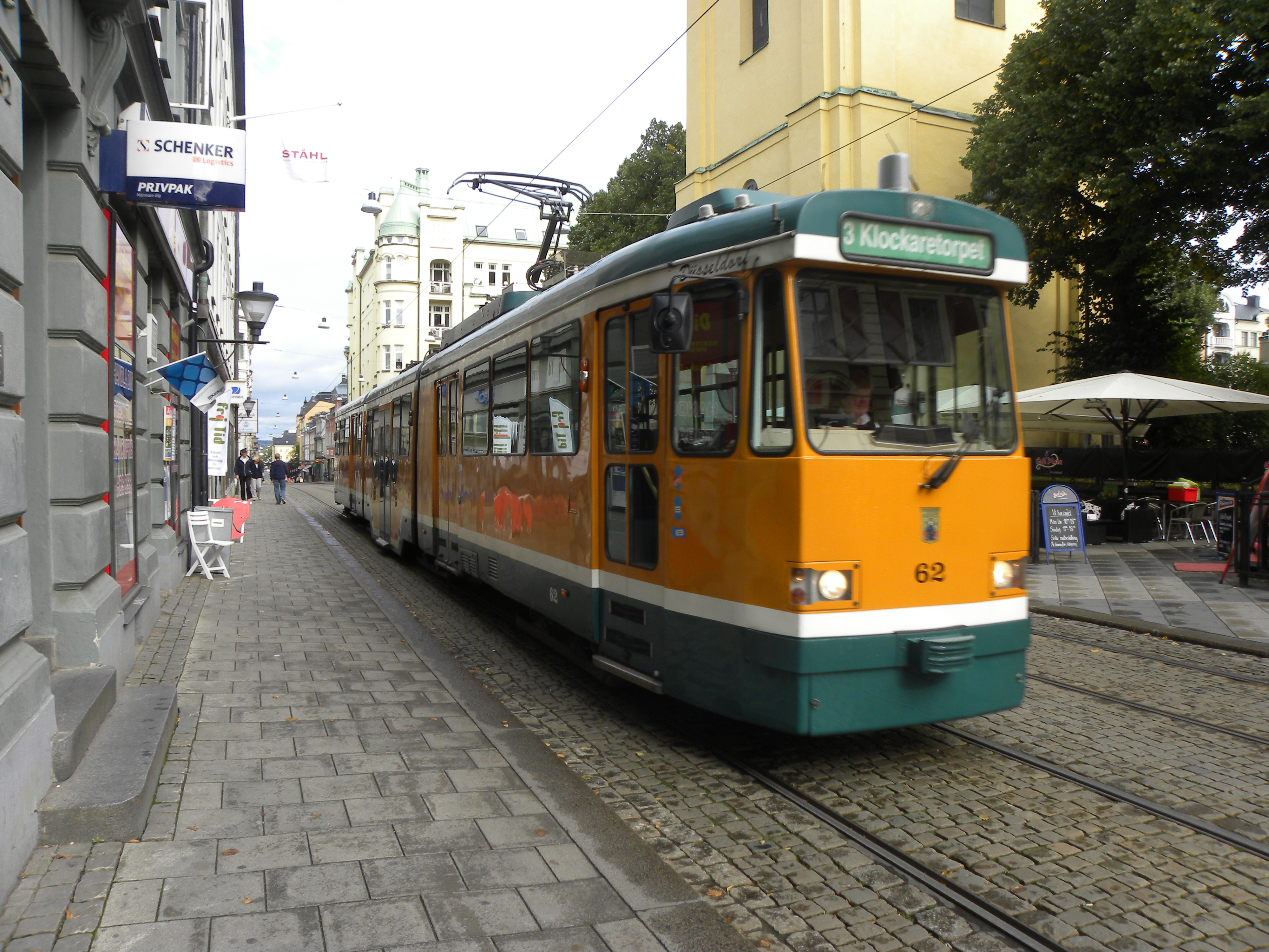 Straßenbahn im schwedischen Norrköping